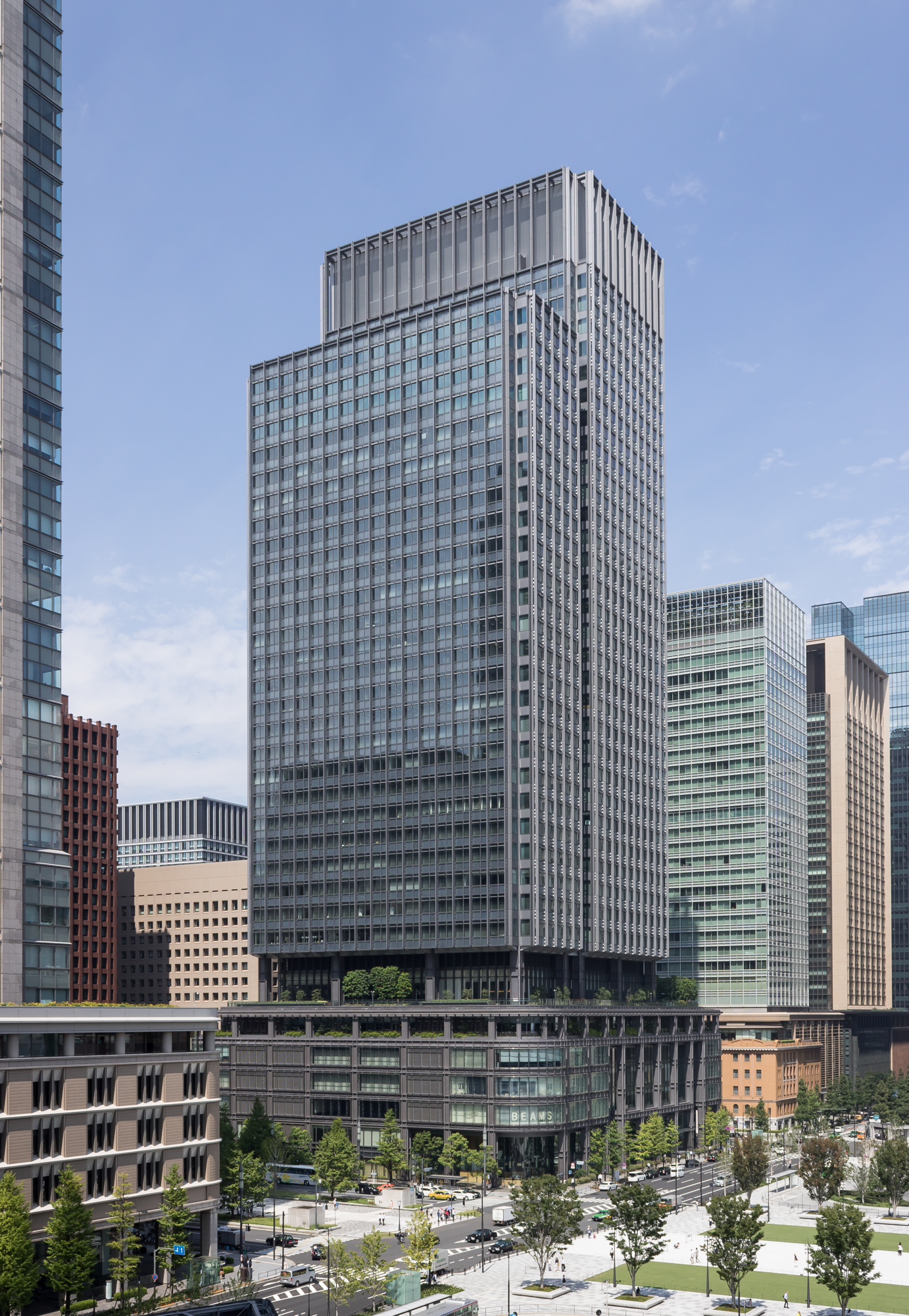 新丸の内ビルディング（東京都千代田区）